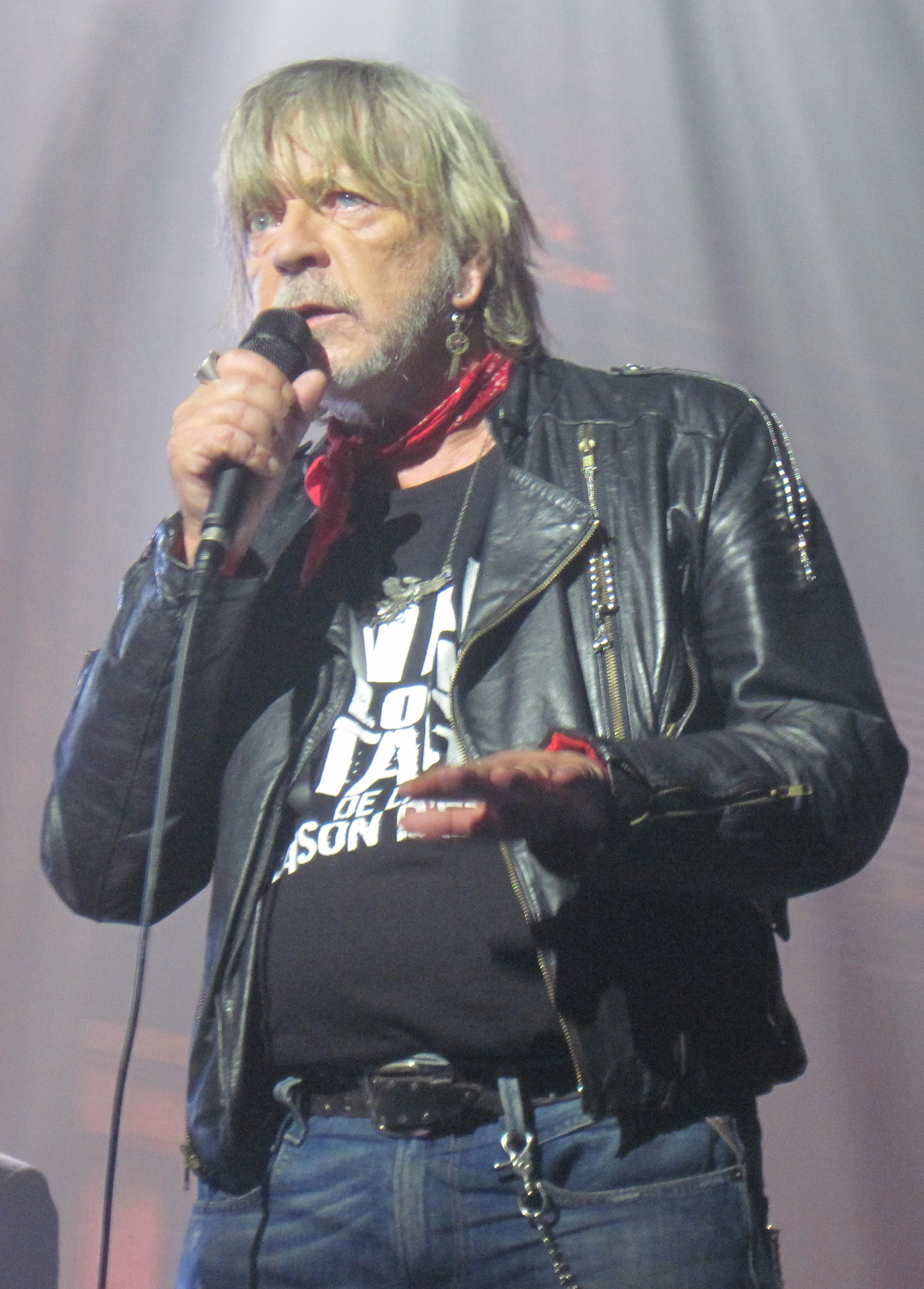 Renaud en concert au Zénith de Paris.